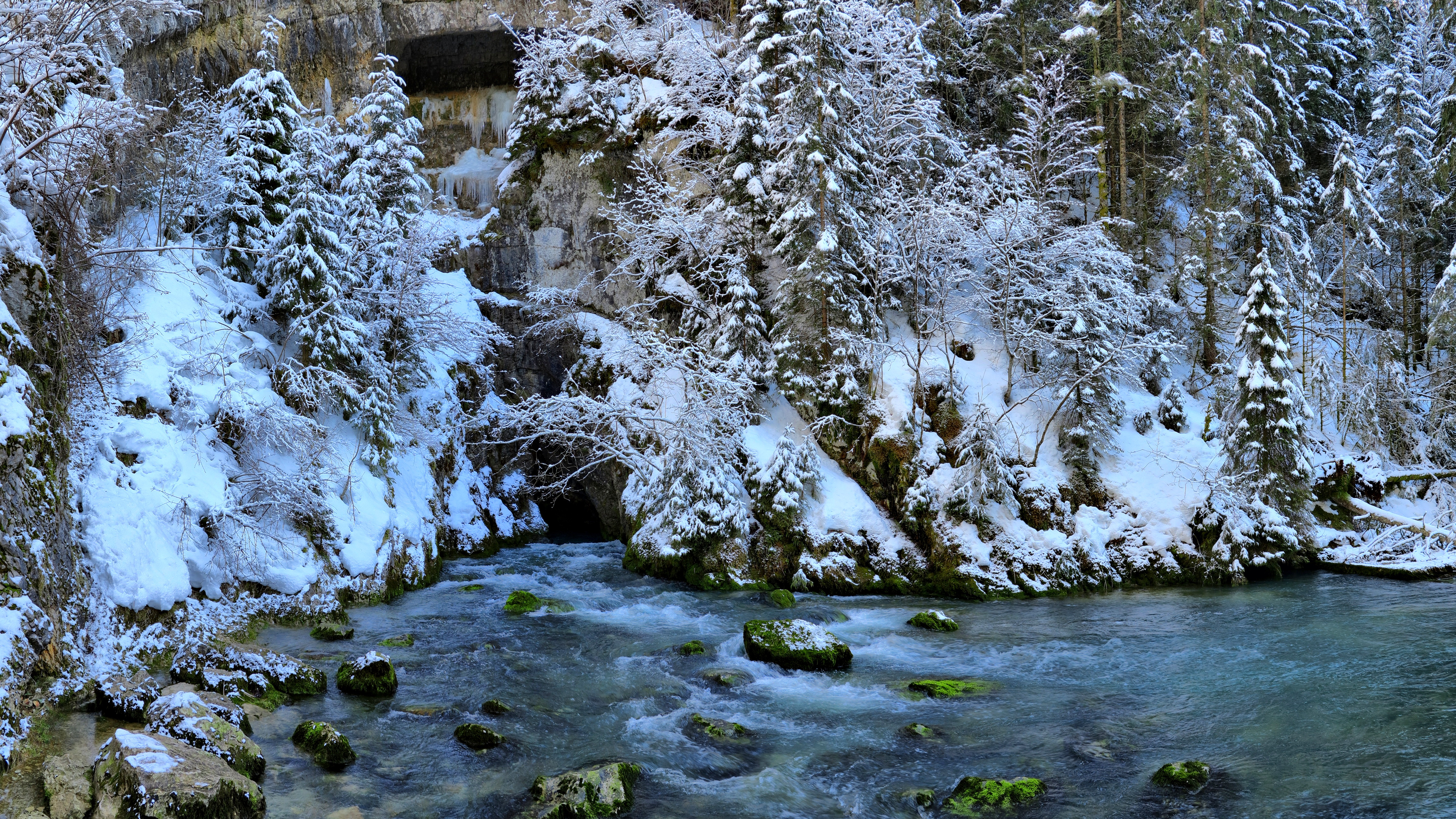 Parc Naturel Régional du Haut Jura : la source du Doubs